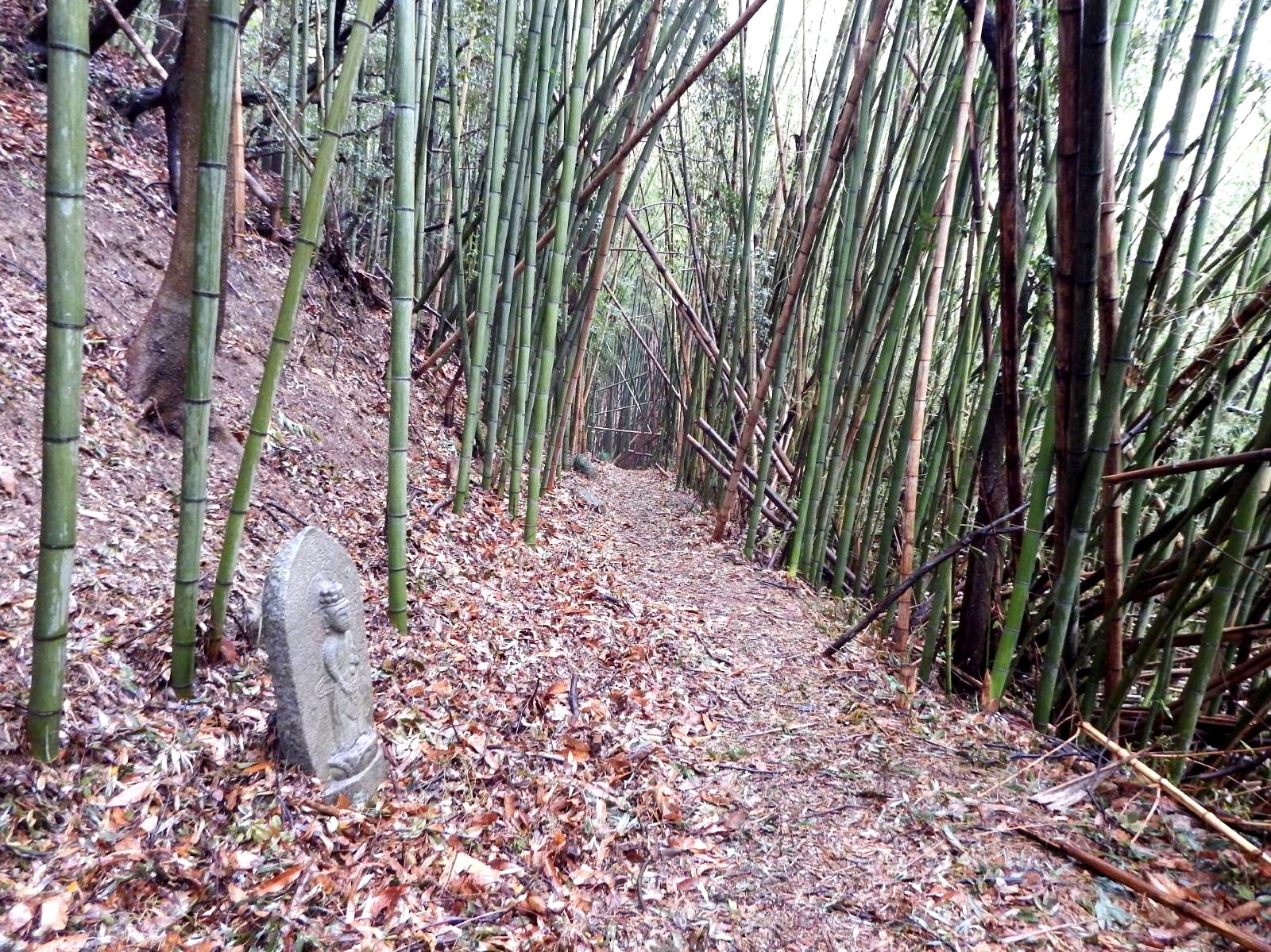 讃岐遍路道曼荼羅寺道